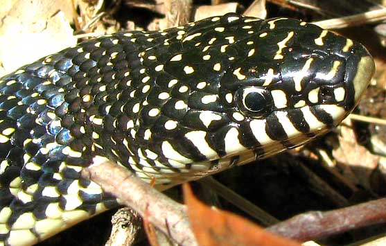 A Speckled Kingsnake, Lampropeltis getula ssp. holbrooki.